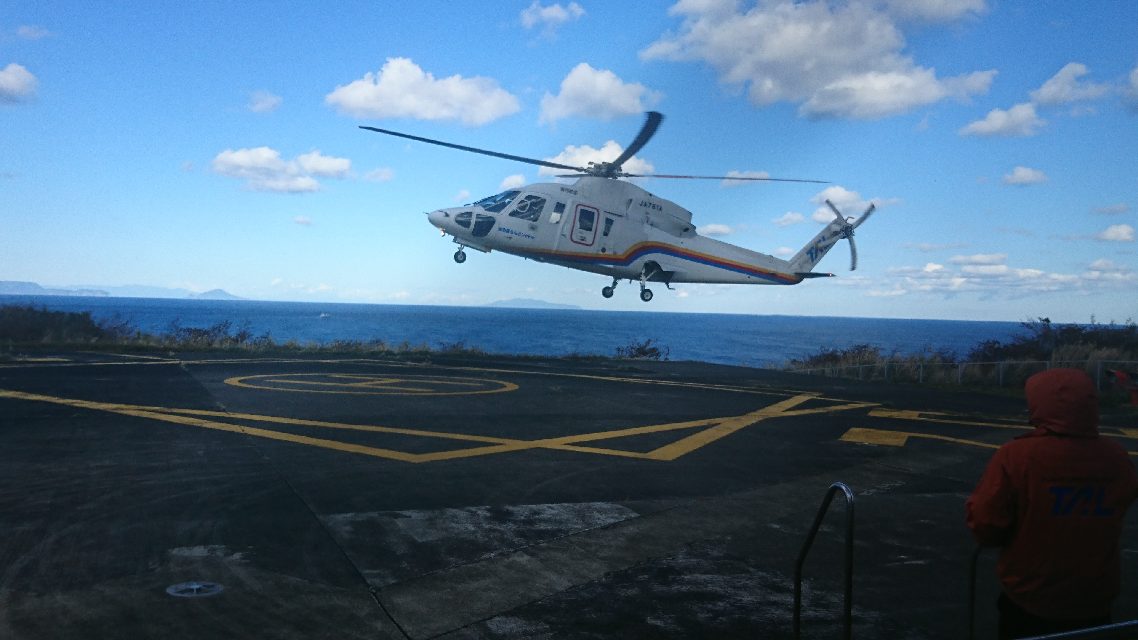 三宅島ヘリポートに着陸する東邦航空所有機